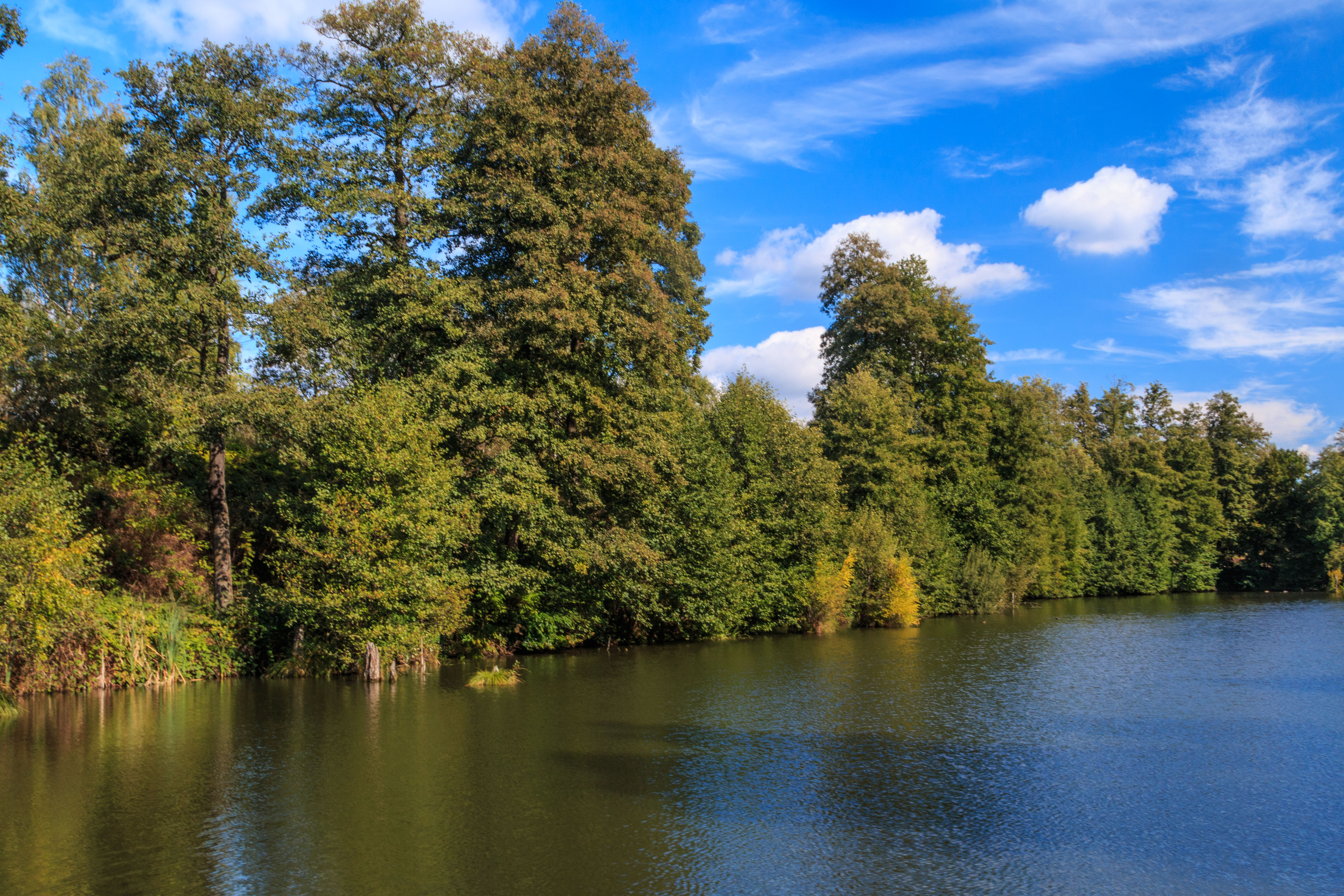 Horní Hvězdovský rybník Project: Vodstvo.